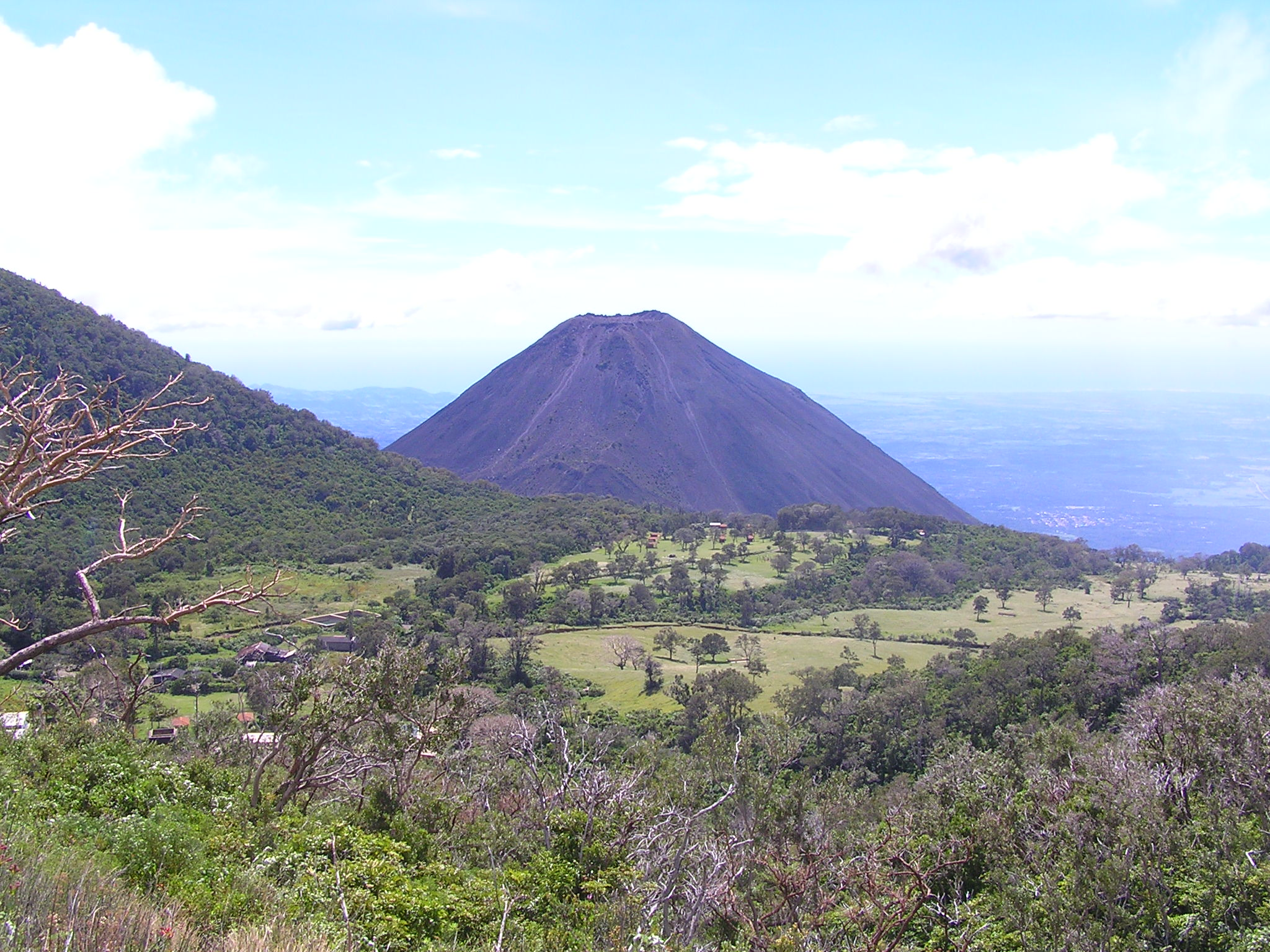 Volcan Izalco in El Salvador